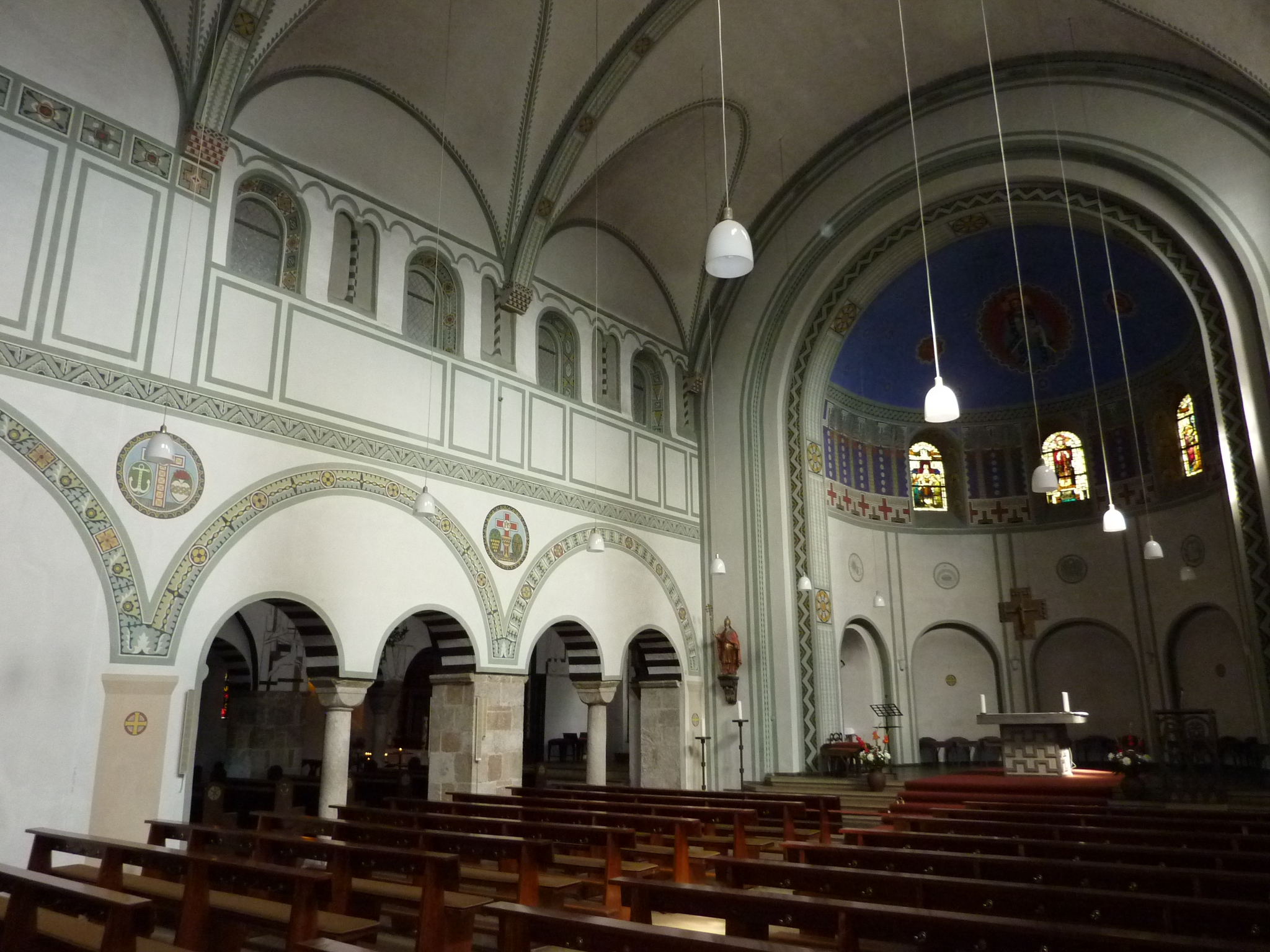 St. Clemens (Bergisch Gladbach)